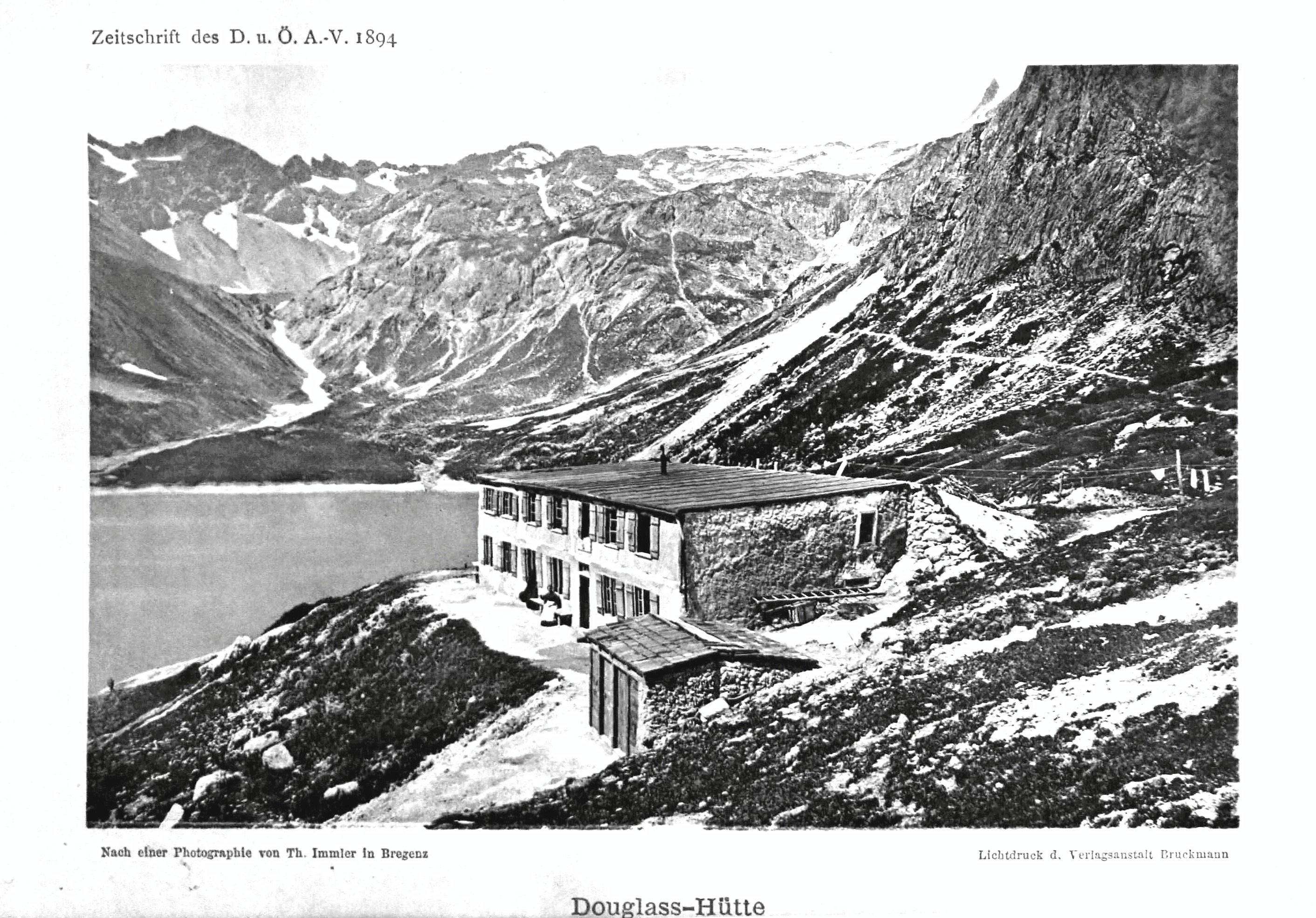 Douglass-Hütte aus Zeitschrift des Deutschen und Oesterreichischen Alpenvereins 1894 Band 25